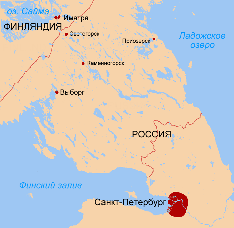 Крельский перешеек на русском